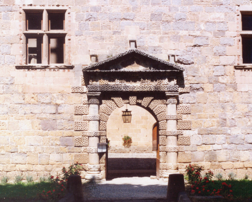 Couiza (Aude, France) Château des ducs de Joyeuse.